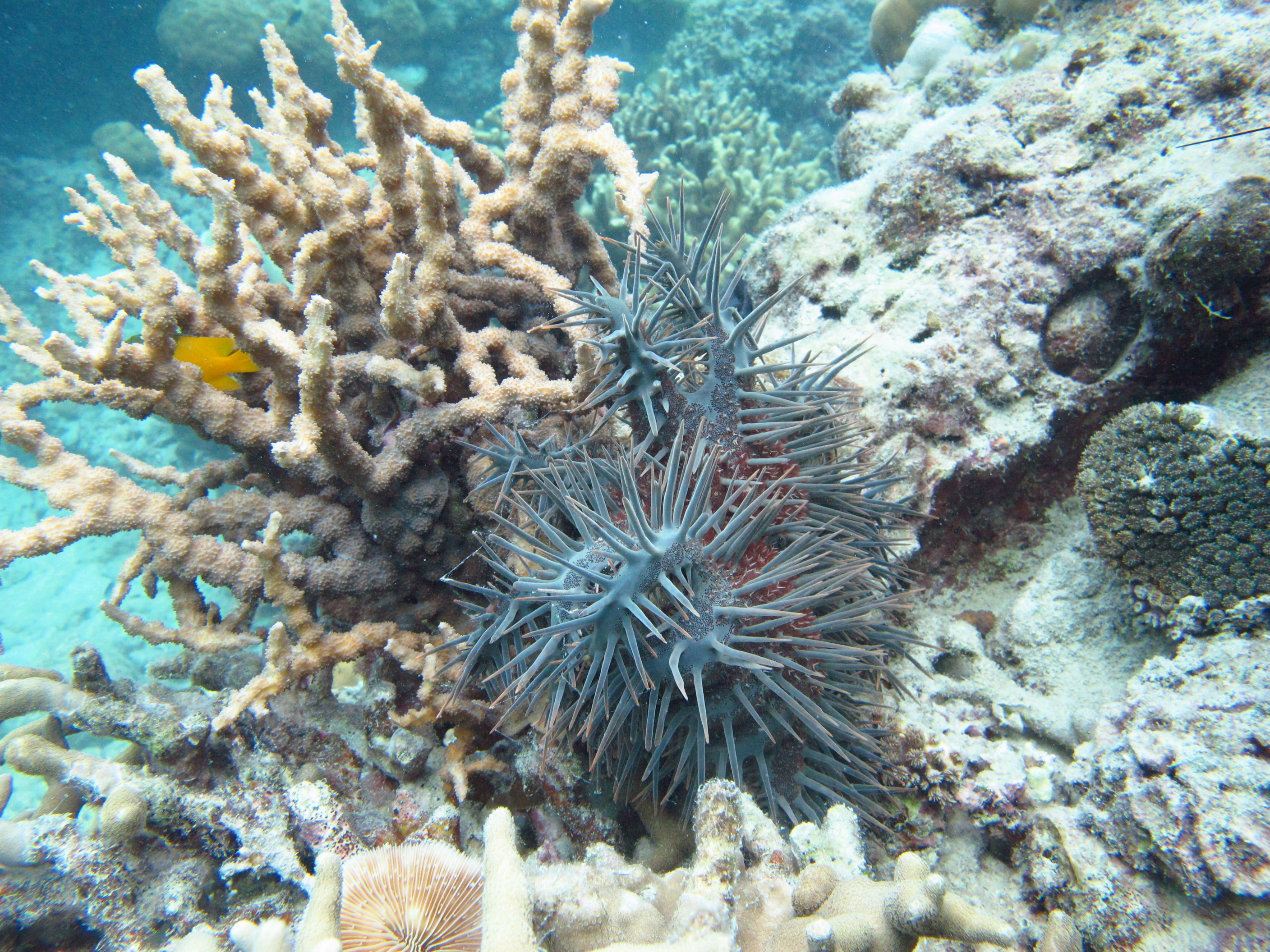 Echinopora horrida atacada por la estrella de mar Acanthaster planci en isla Aureed, Estrecho de Torres, Australia